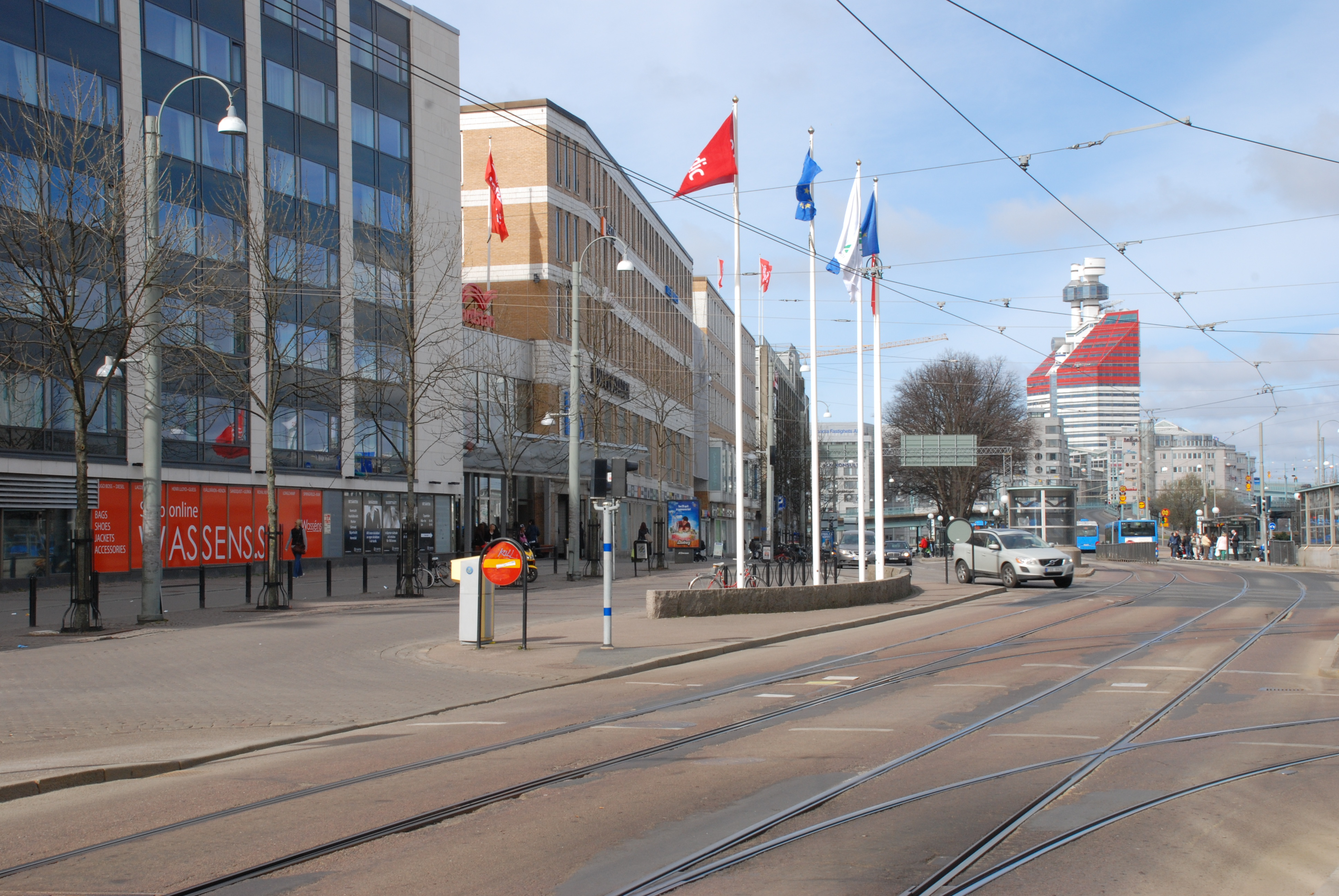 Nils Ericsonsgatan i riktning från Norra Hamngatan. Till vänster Nordstan med Hotell Europa och Femmanhuset.